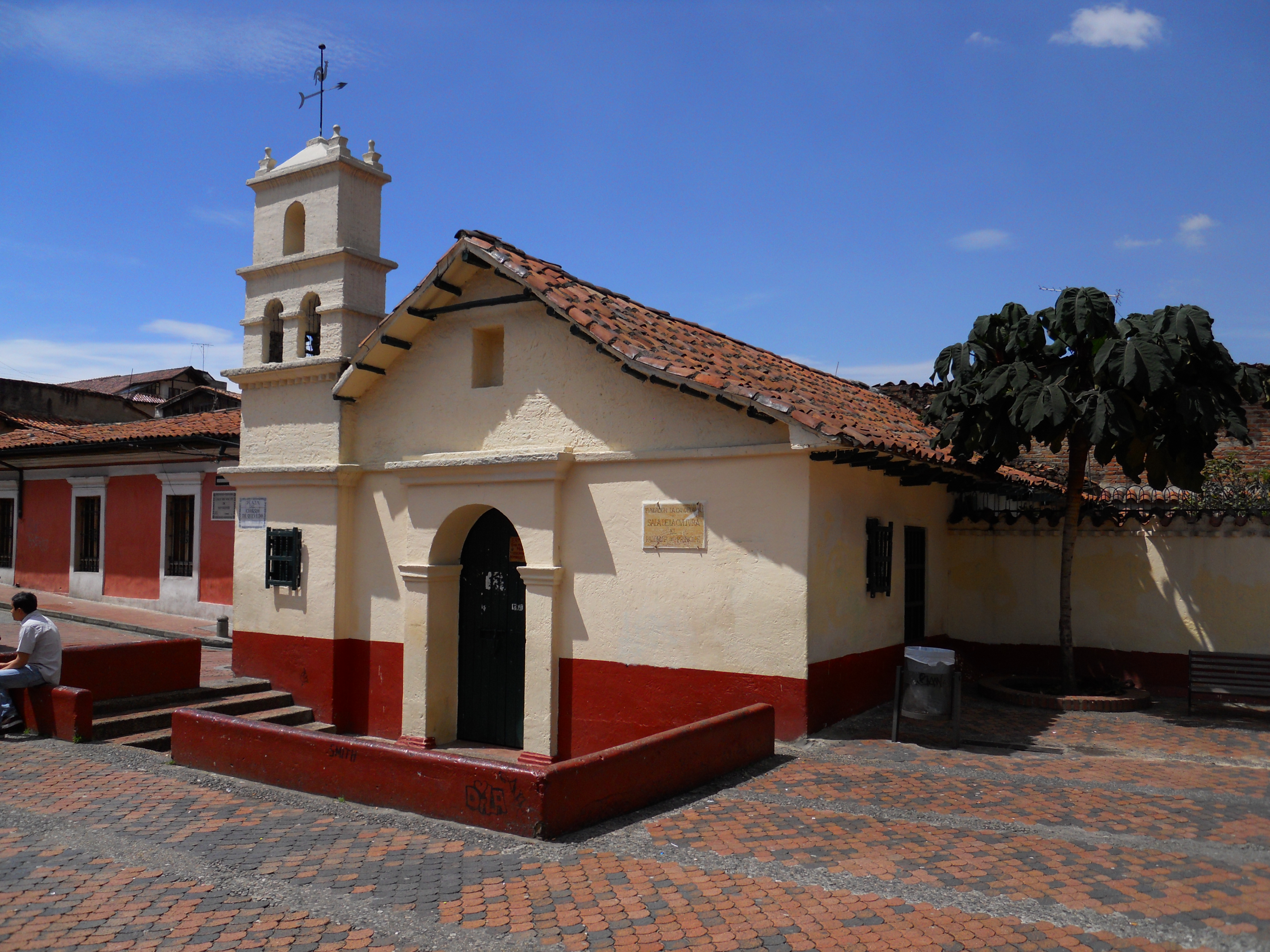 Costado nororiental de la iglesia del Chorro de Quevedo, en La Candelaria, centro histórico de Bogotá D. C.